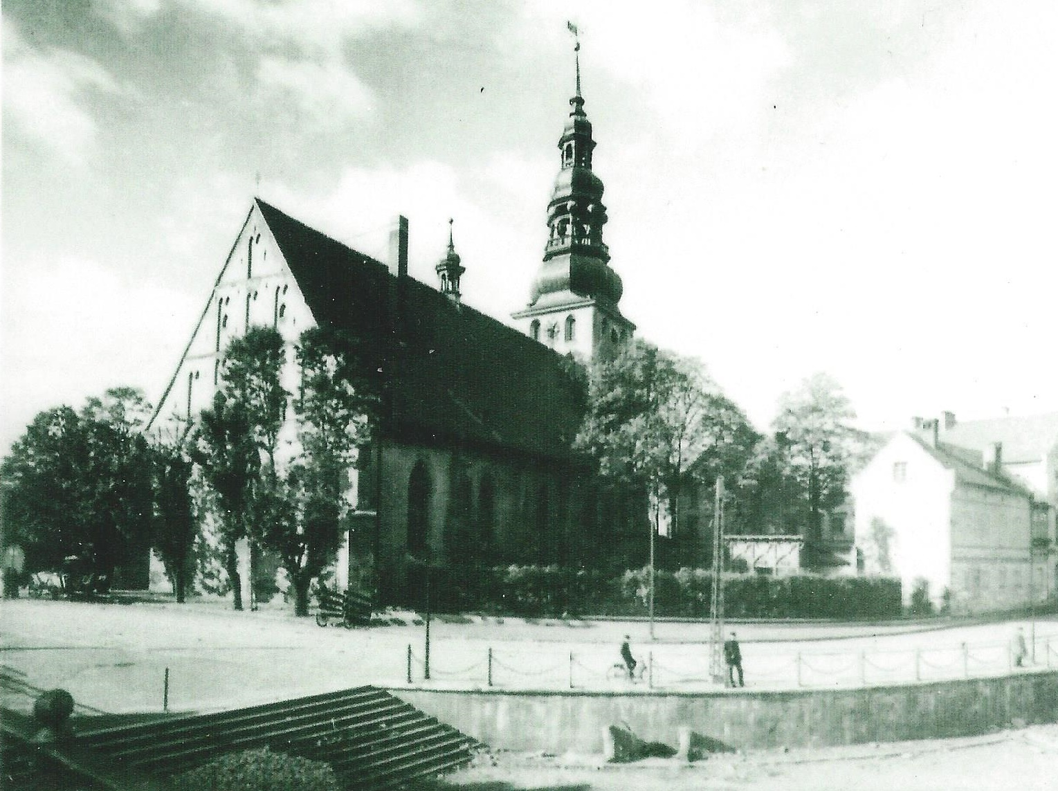 Deutsche Kirche in Tilsit, von Nordosten gesehen